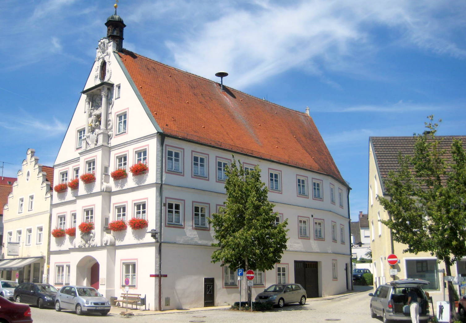 Geisenfeld liegt im Landkreis Pfattenhofen a.d. Ilm